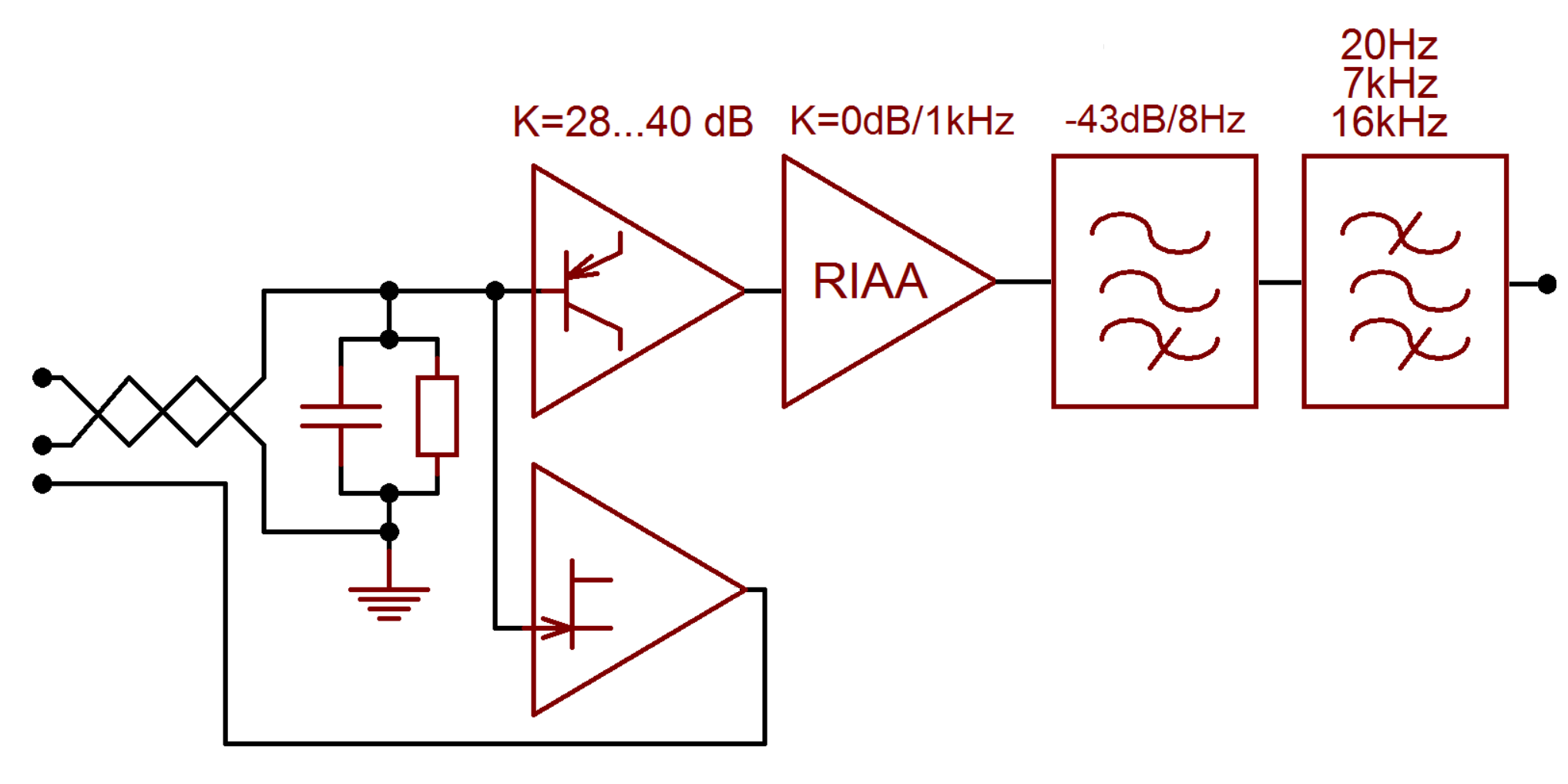 Блок-схема эталонного студийного ММ-корректора Neumann PUE74 // источник: Vogel, B. The Sound of Silence: Lowest-Noise RIAA Phono-Amps: Designer’s Guide. — Springer, 2008 - pp. 144-146